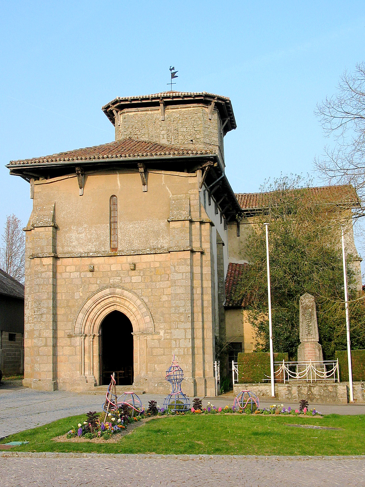 Église Saint-Christophe de Beaune-les-Mines, Beaune-les-Mines (Inscrit, 1926)